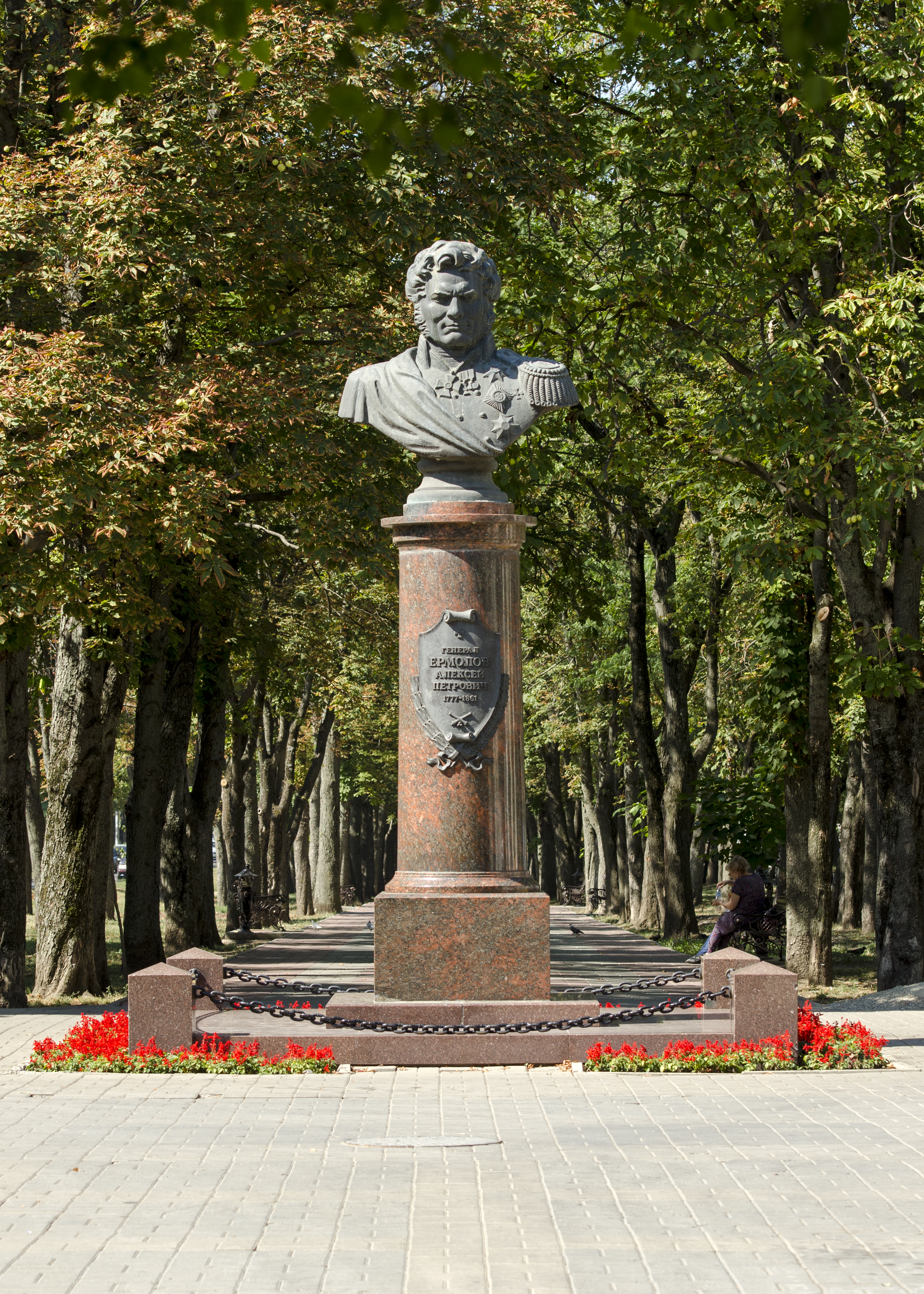 Бульвар на проспекте К. Маркса (бульвар им генерала Ермолова), Ставрополь This image is related to the protected area of Russia number 2610150